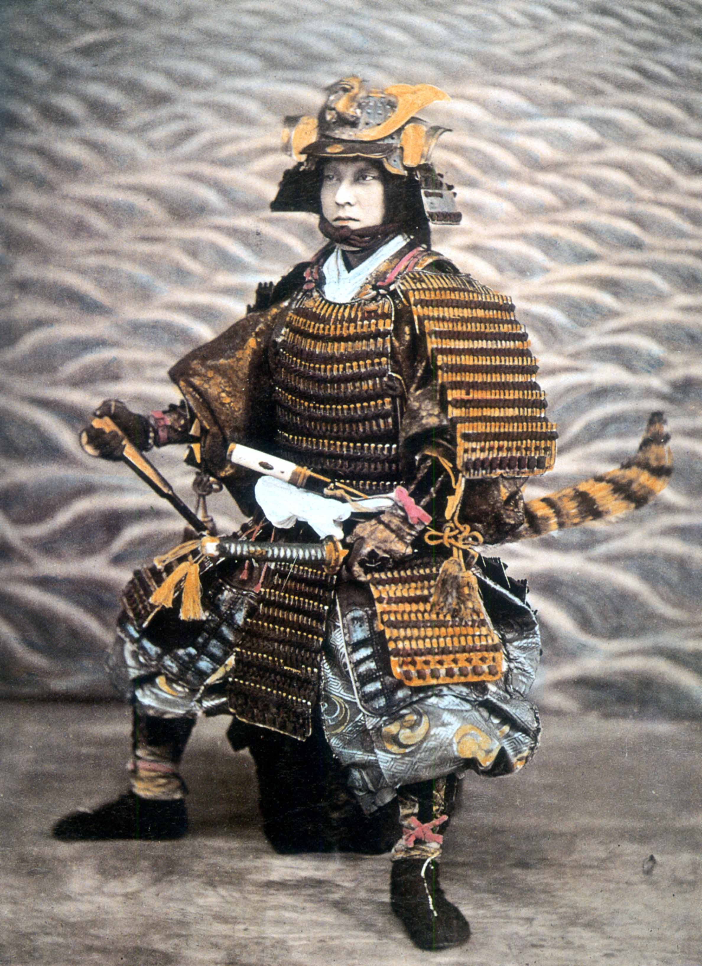 大鎧を着用した侍。鶏卵紙手彩色。